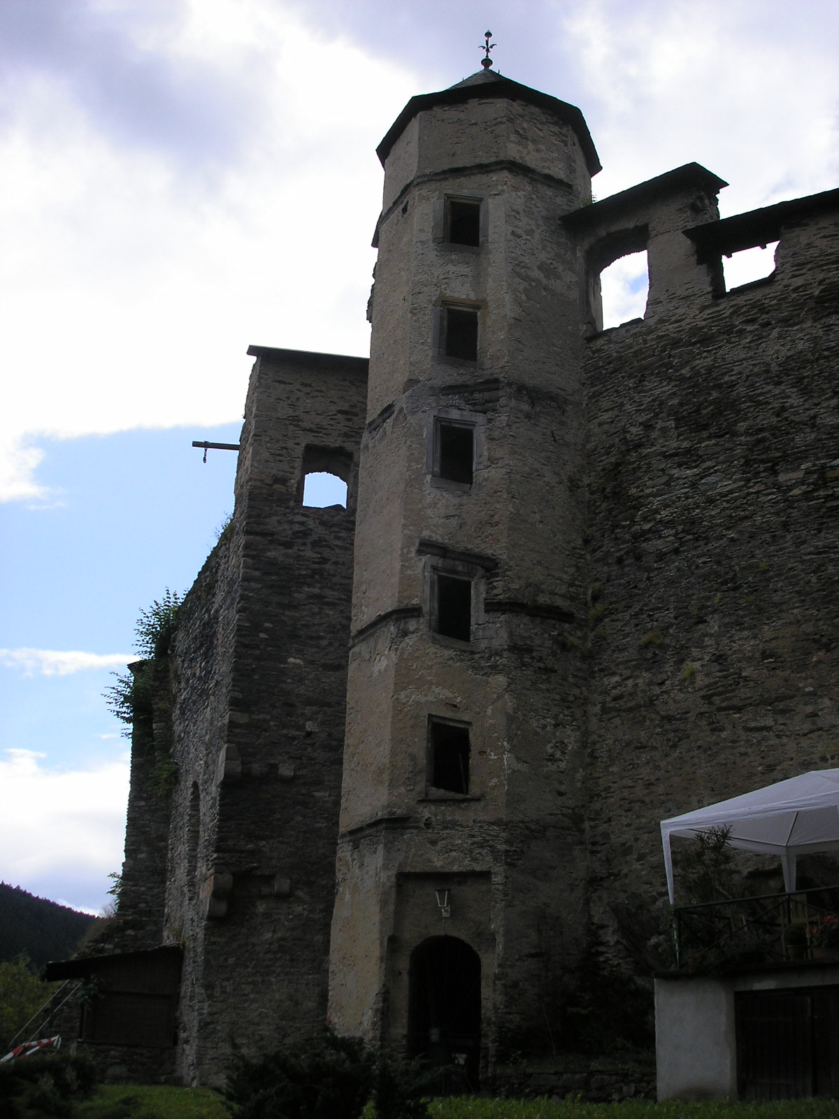 Teile der Burgruine Wespenstein oberhalb von Gräfenthal (Thüringen).